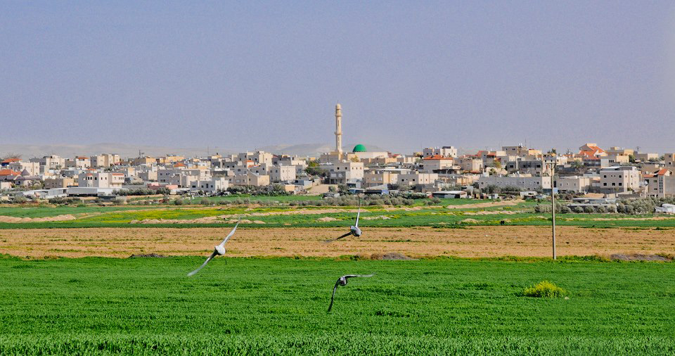 قرية تل السبع